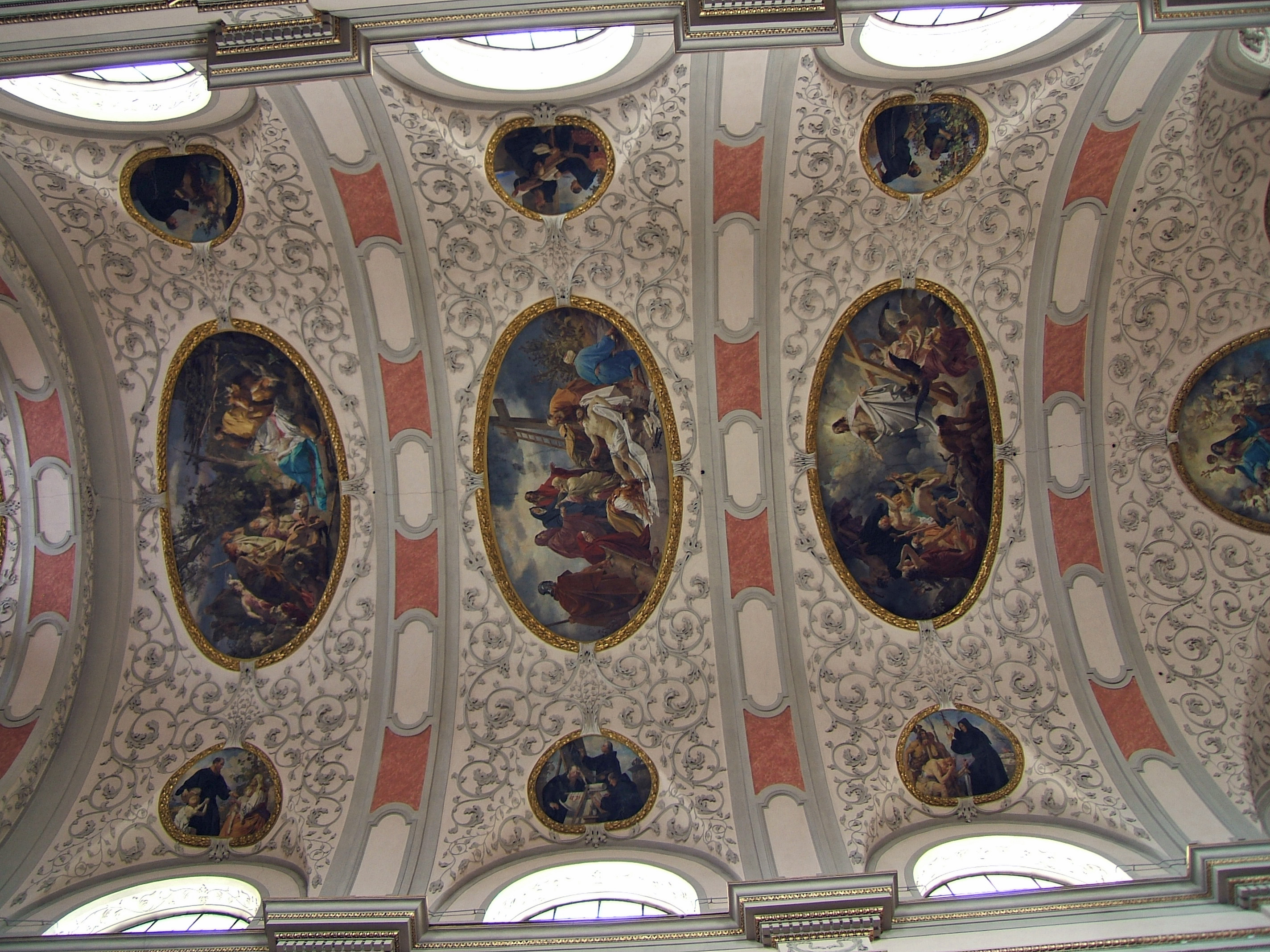 Deckenfresko der Stiftskirche